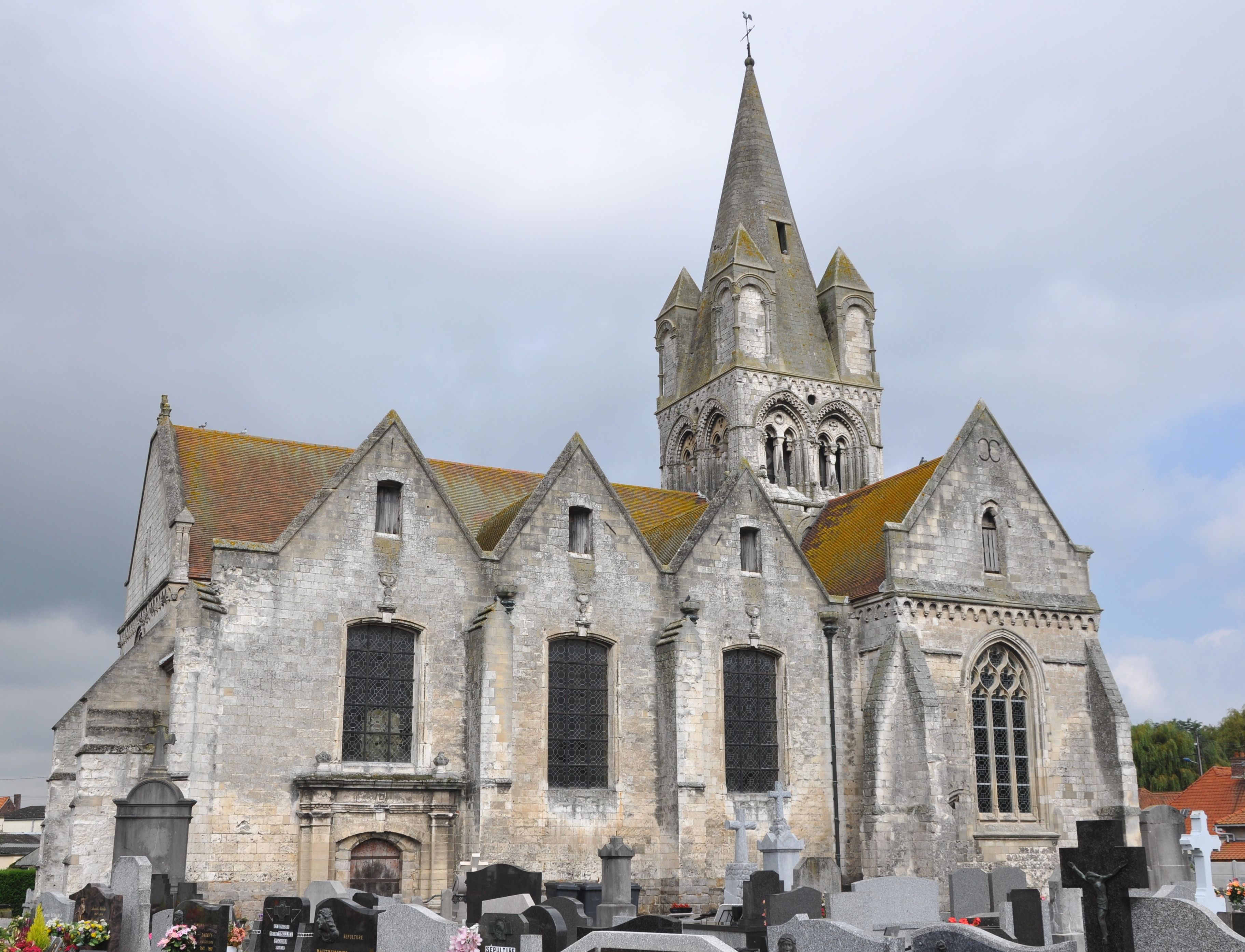 Église Saint-Nicolas de Guarbecque, (Classé, 1909) .